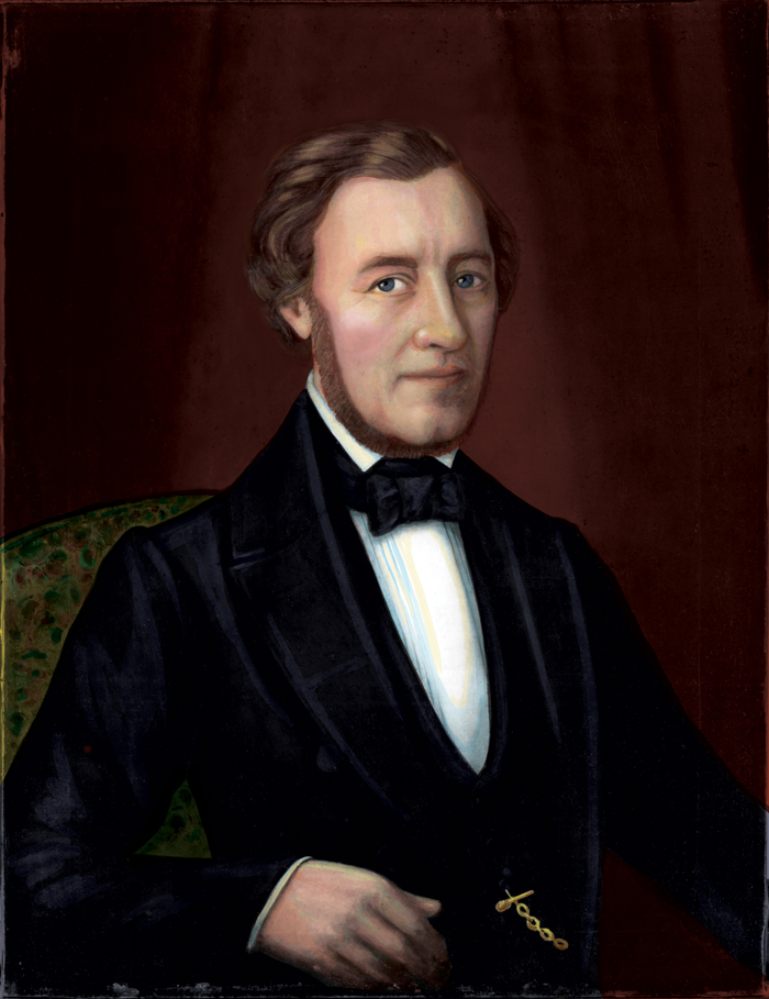 Häradshövding